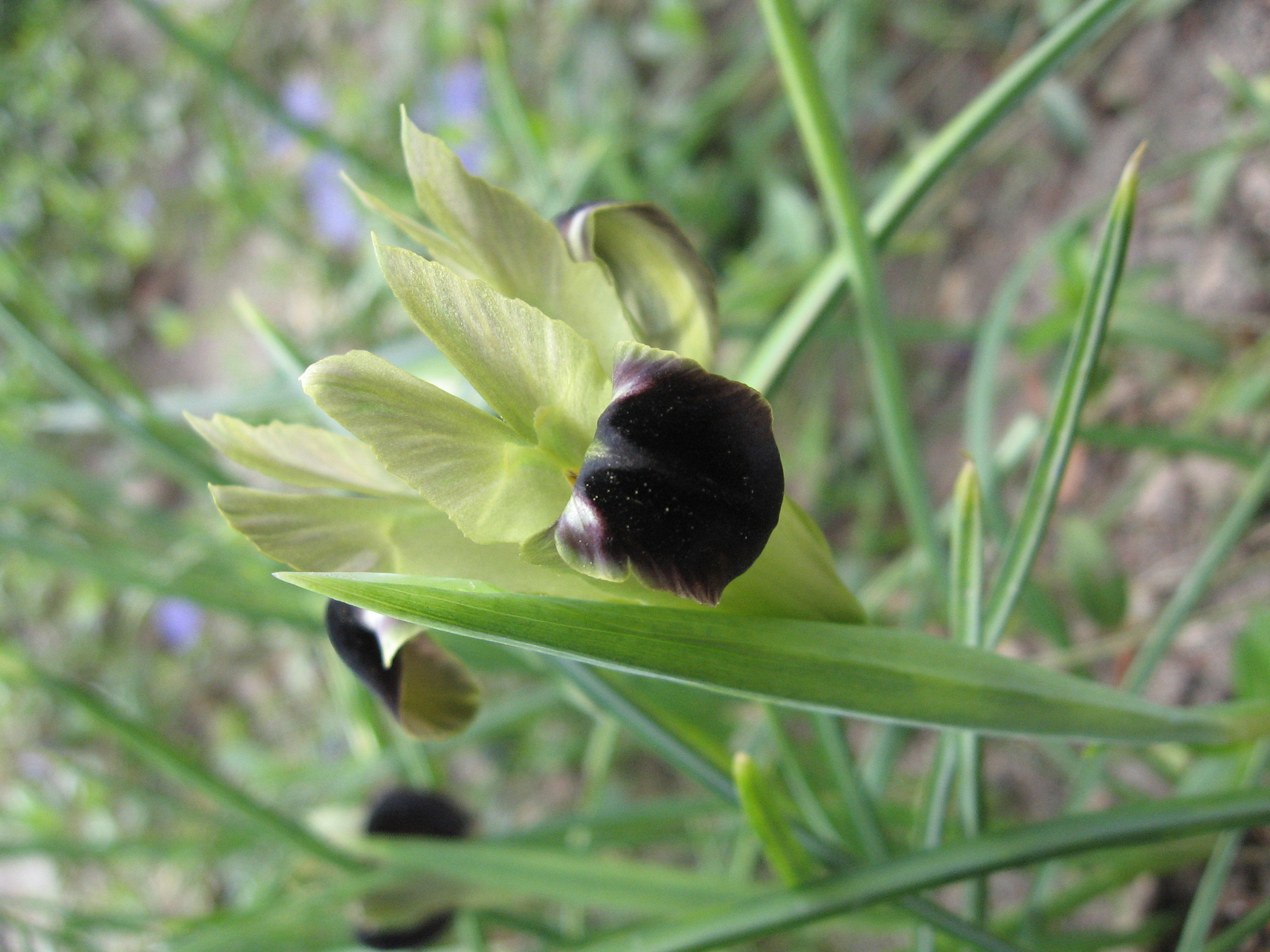 Hermodactylus tuberosus. Real Jardín Botánico, Madrid.